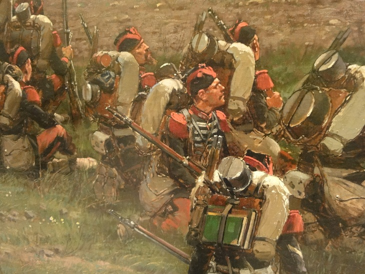 Édouard Detaille (1848-1912) bataille de Rezonville 1870 "Détachement de grenadiers de la garde impériale."